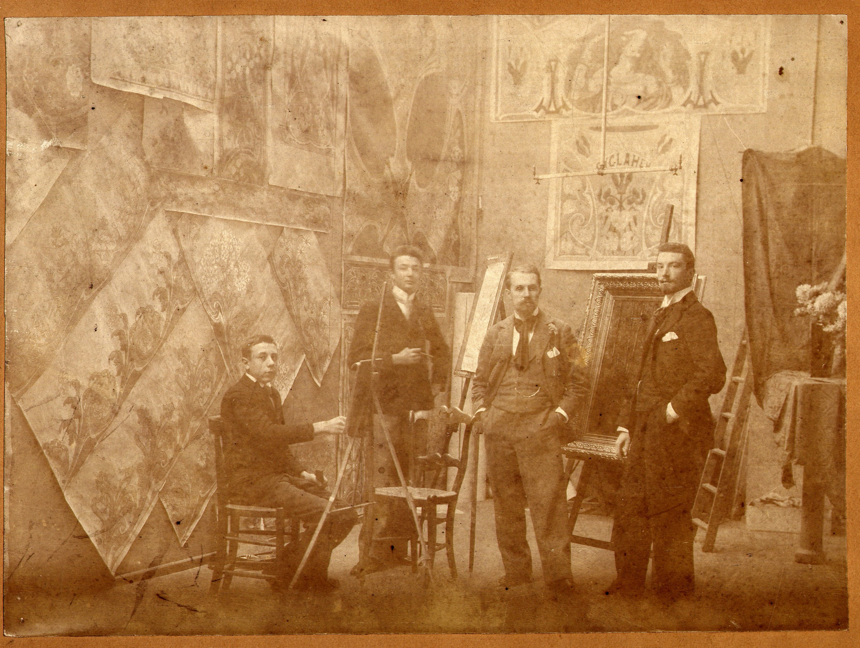 atelier de Gabriel van Dievoet, 71, rue Faider à Bruxelles (debout à droite Gabriel van Dievoet, à son côté Léon van Cutsem et à gauche deux aides)